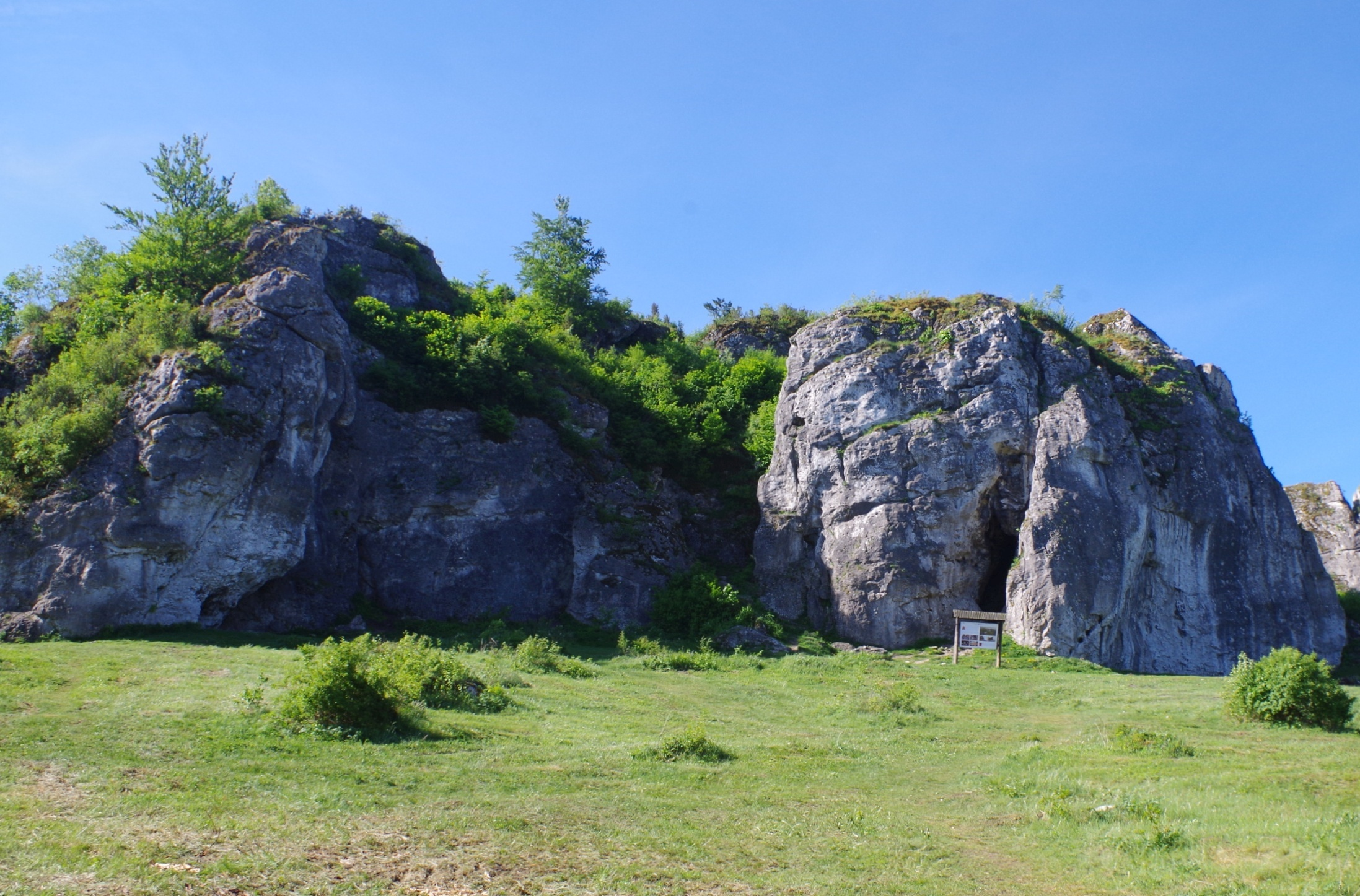 Skały Skrzypek i Skała z Grotą w grupie Mirowskich sSkał